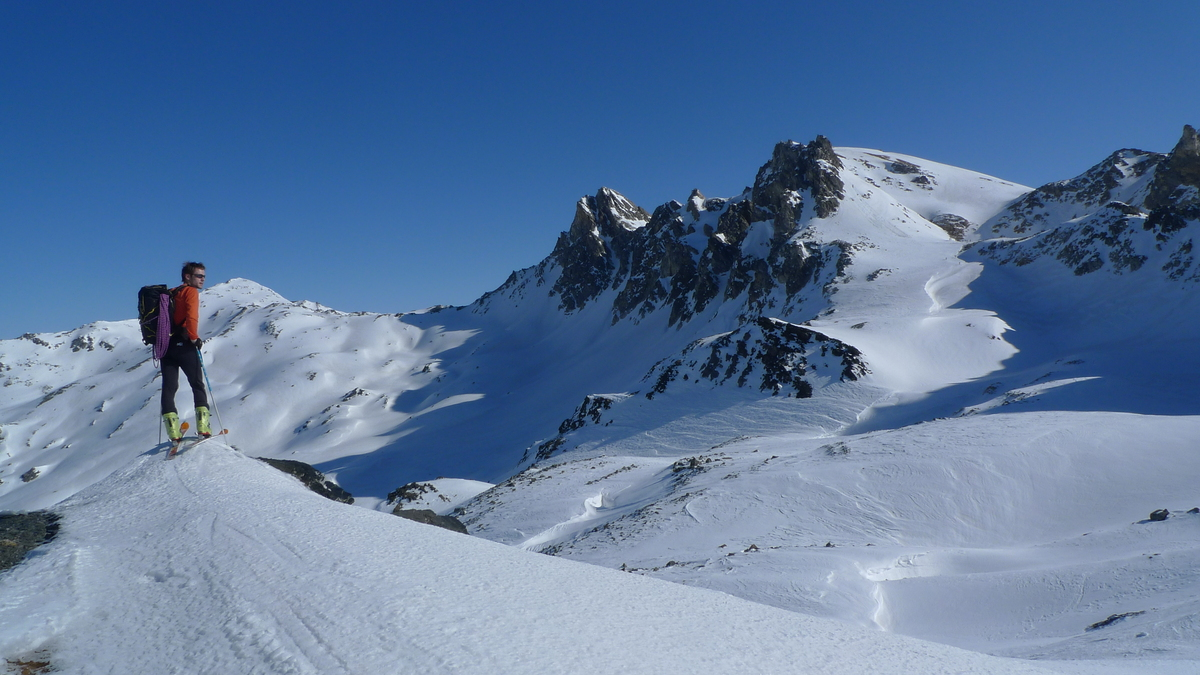 Le Pic et le Mont du Thabor depuis le col de Valmenier